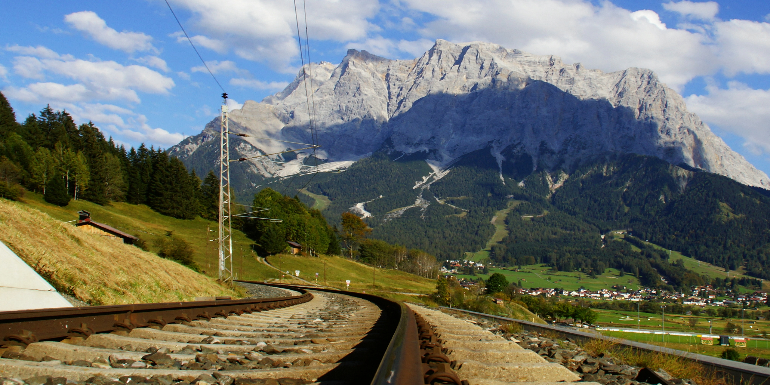 Blick von Lermoos über Außerfernbahn in Richtung Ehrwald auf das Wettersteingebirge mit Zugspitze links oben - Tirol Österreich - Foto Wolfgang Pehlemann DSC02183